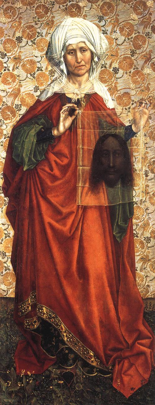 St Veronica